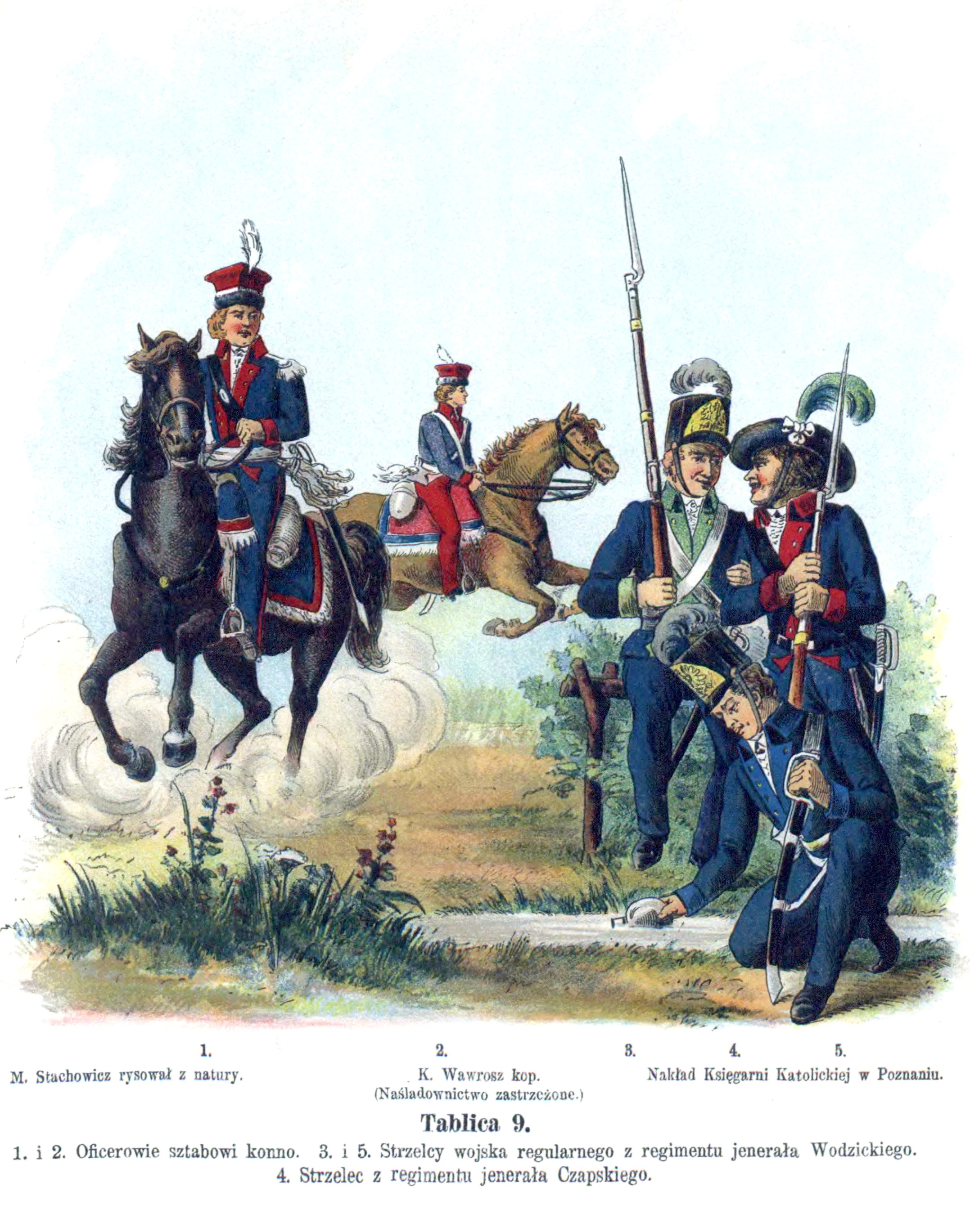 Kościuszko Uprising army